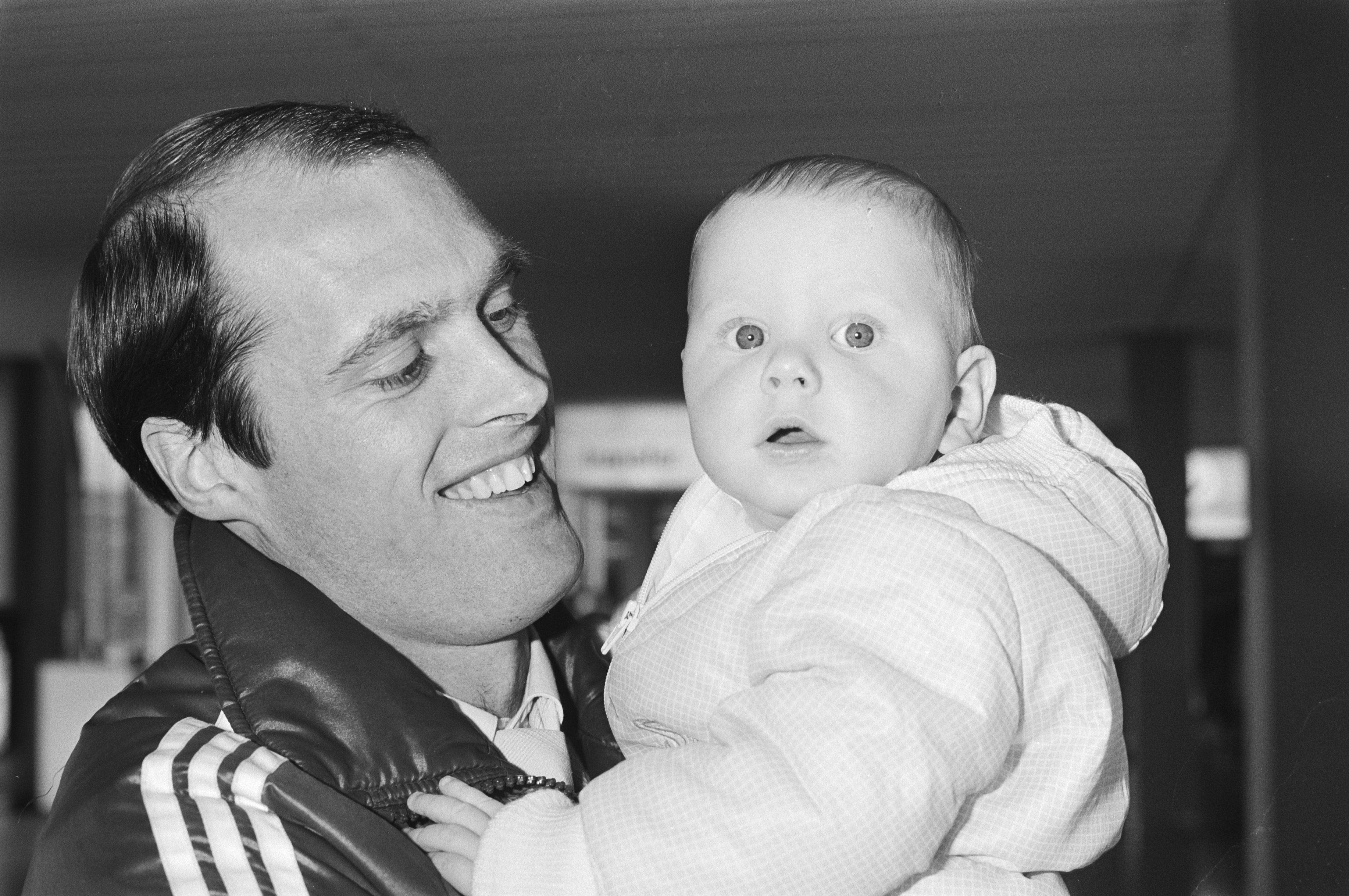 Collectie / Archief : Fotocollectie Anefo Reportage / Serie : Johnny Metgod op Schiphol voor training met het Nederlands elftal Beschrijving : Johnny Metgod met zijn zoon Datum : 10 februari 1983 Locatie : Noord-Holland, Schiphol Trefwoorden : aankomst en vertrek, baby's, portretten, sport, voetbal Persoonsnaam : Metgod, Johnny Fotograaf : Croes, Rob C. / Anefo Auteursrechthebbende : Nationaal Archief Materiaalsoort : Negatief (zwart/wit) Nummer archiefinventaris : bekijk toegang 2.24.01.05 Bestanddeelnummer : 932-4976